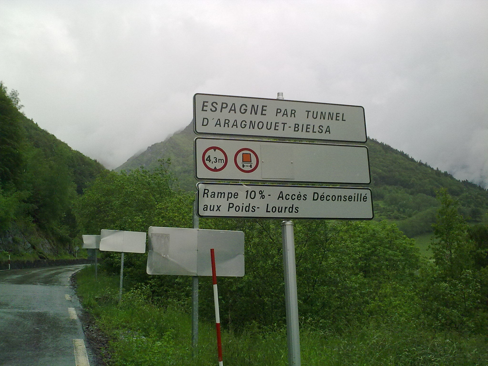 Tunnel Aragnouet-Bielsa, juin 2010.